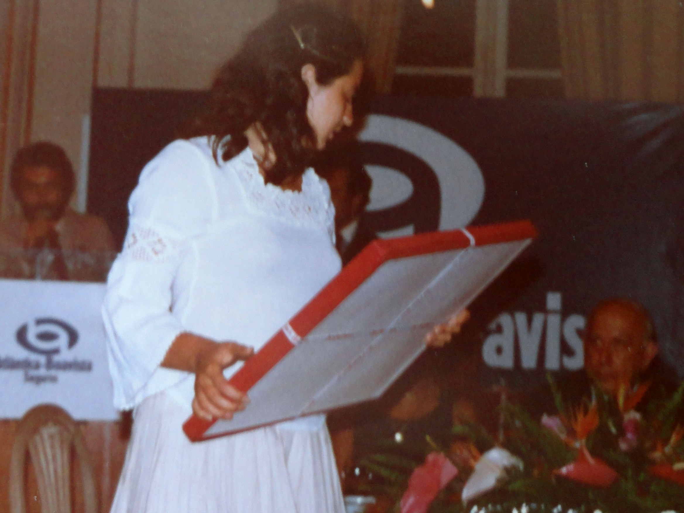 Nana Ioseliani bei der Siegerehrung, Interzonenturnier der Frauen 1979 in Rio de Janeiro.